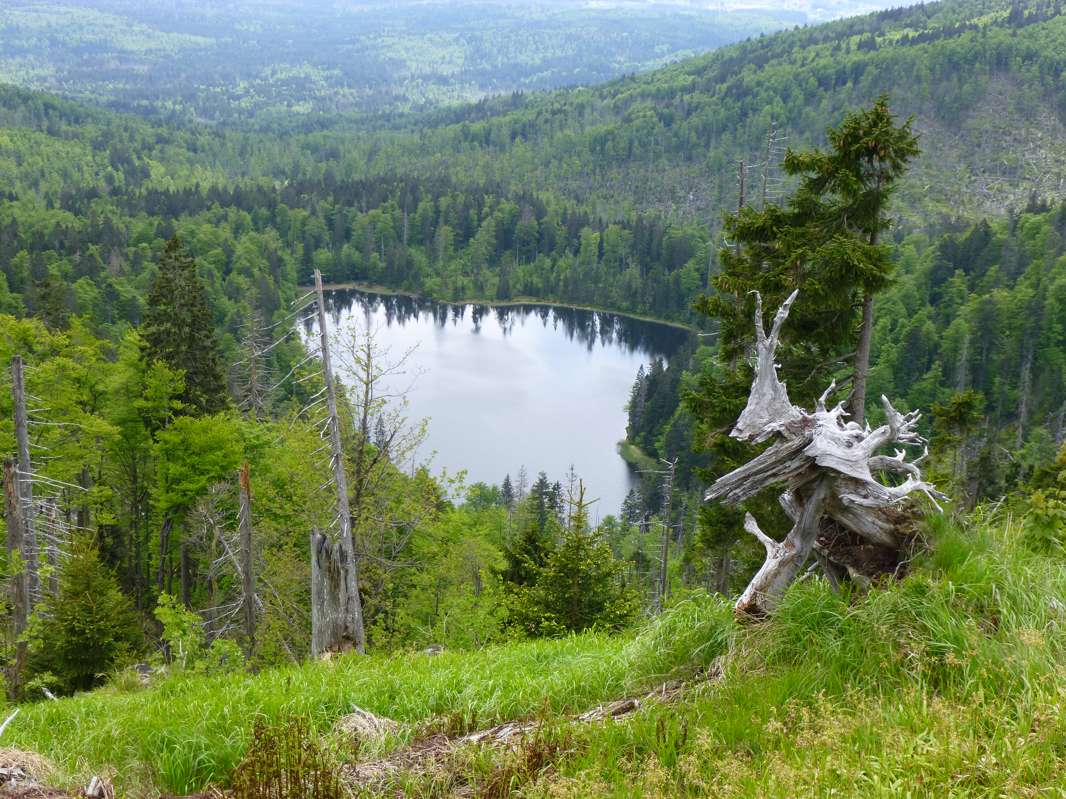 Blick von oben (Großer Rachel - Abstieg über die Auerhahn-Route) auf das Kar des Rachelsees. Geotop im Landkreis Freyung-Grafenau, 272R019. Nationalpark Bayerischer Wald.